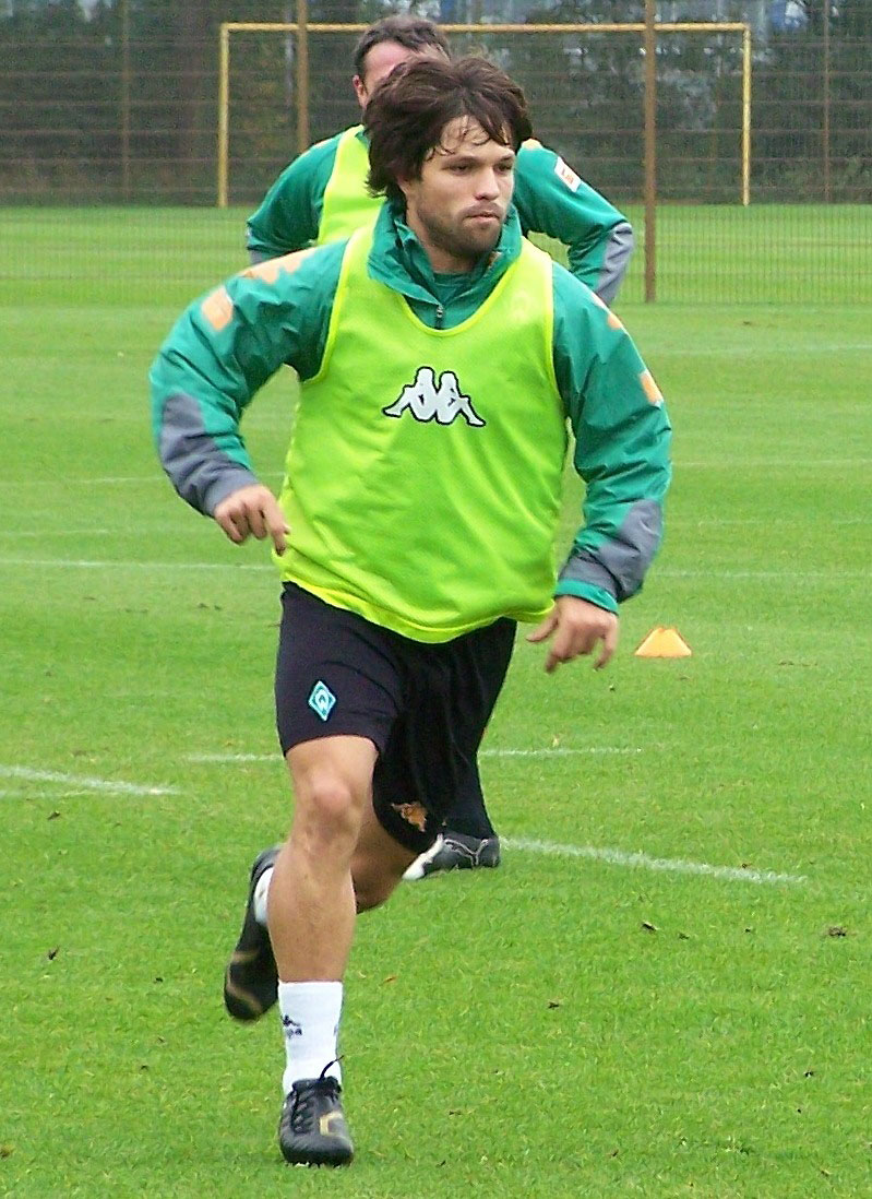 Diego